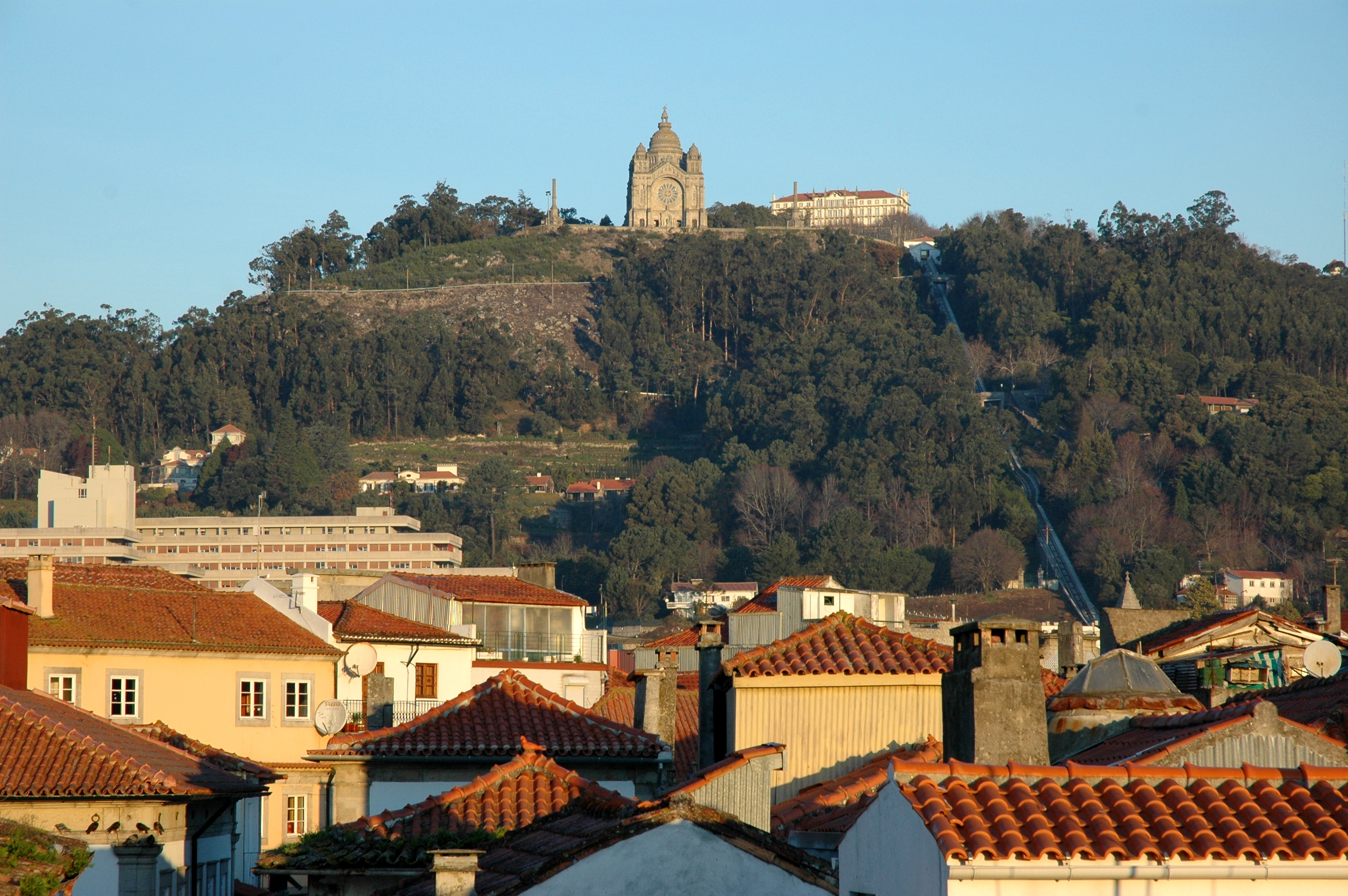 Viana do Castelo - Monte de Santa Luzia